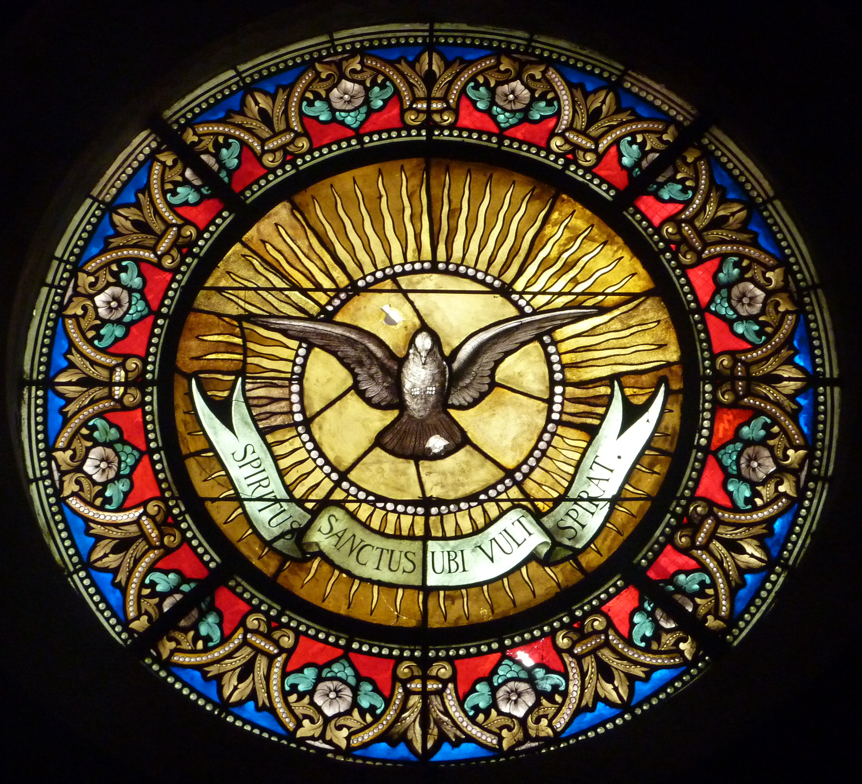 Colombe du Saint-Esprit, symbole de la Confrérie et devise : Spiritus Sanctus ubi vult spirat (L'Esprit-Saint souffle où il veut).